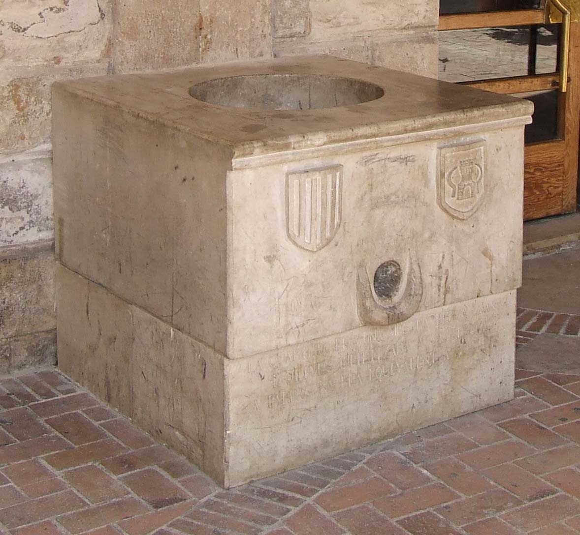 Mesura de la quartera de Falset, a la Plaça de la Quartera, davant de la Casa de la Vila.